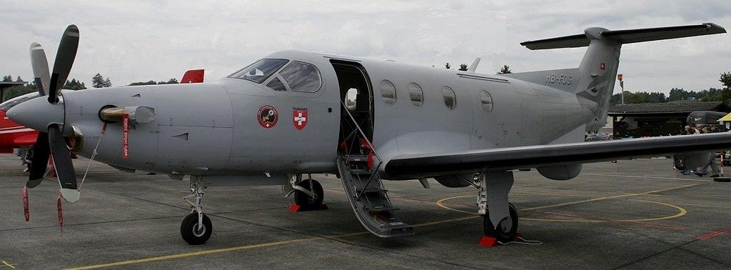 HB-FOG der armasuisse / Schweizer Luftwaffe, FLORAKO Kalibrierungs flugzeug PC-12